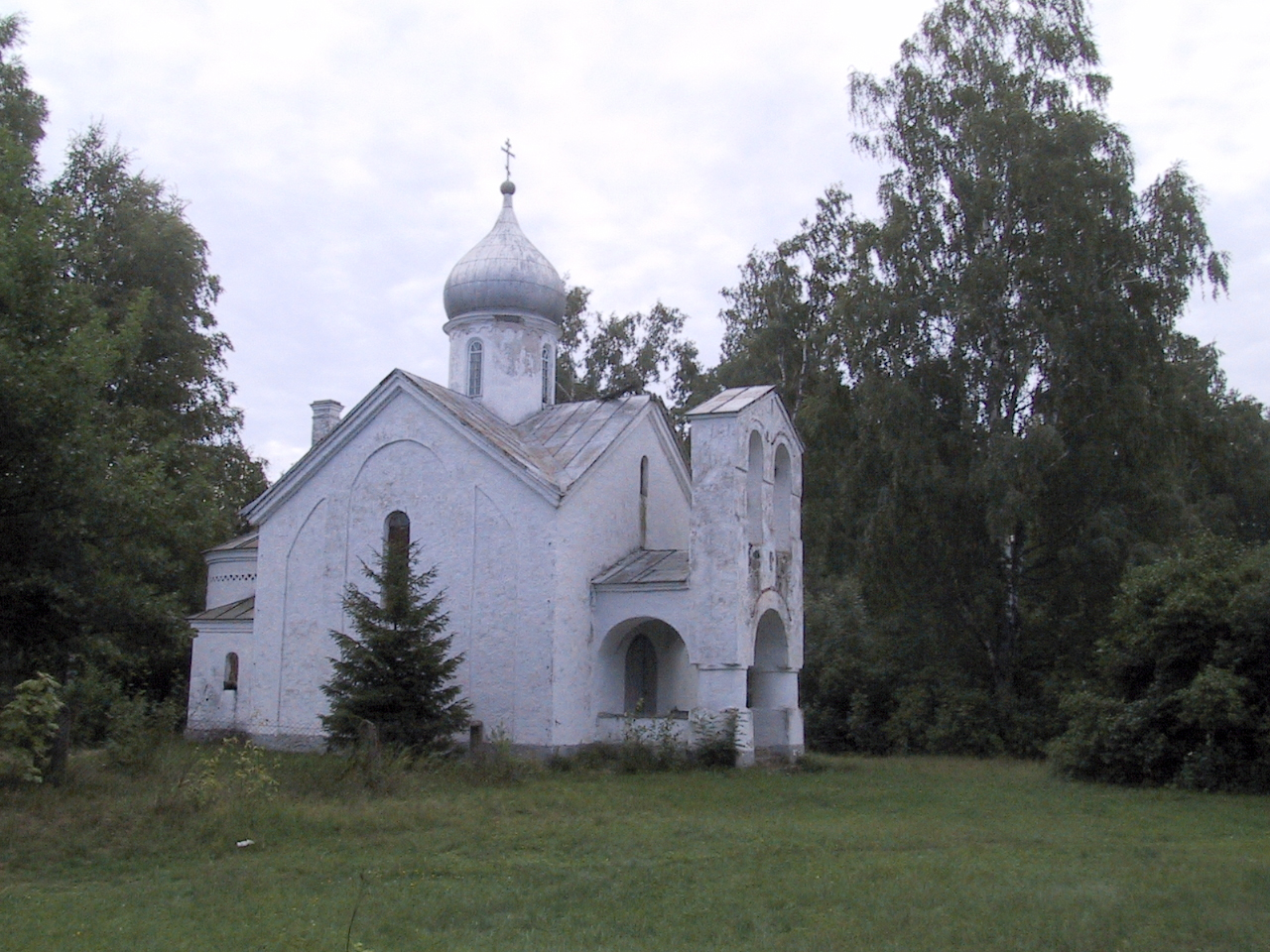 Oldbeliever church in Piiri, Piiresaare Island, Lake Peipsi, Estonia